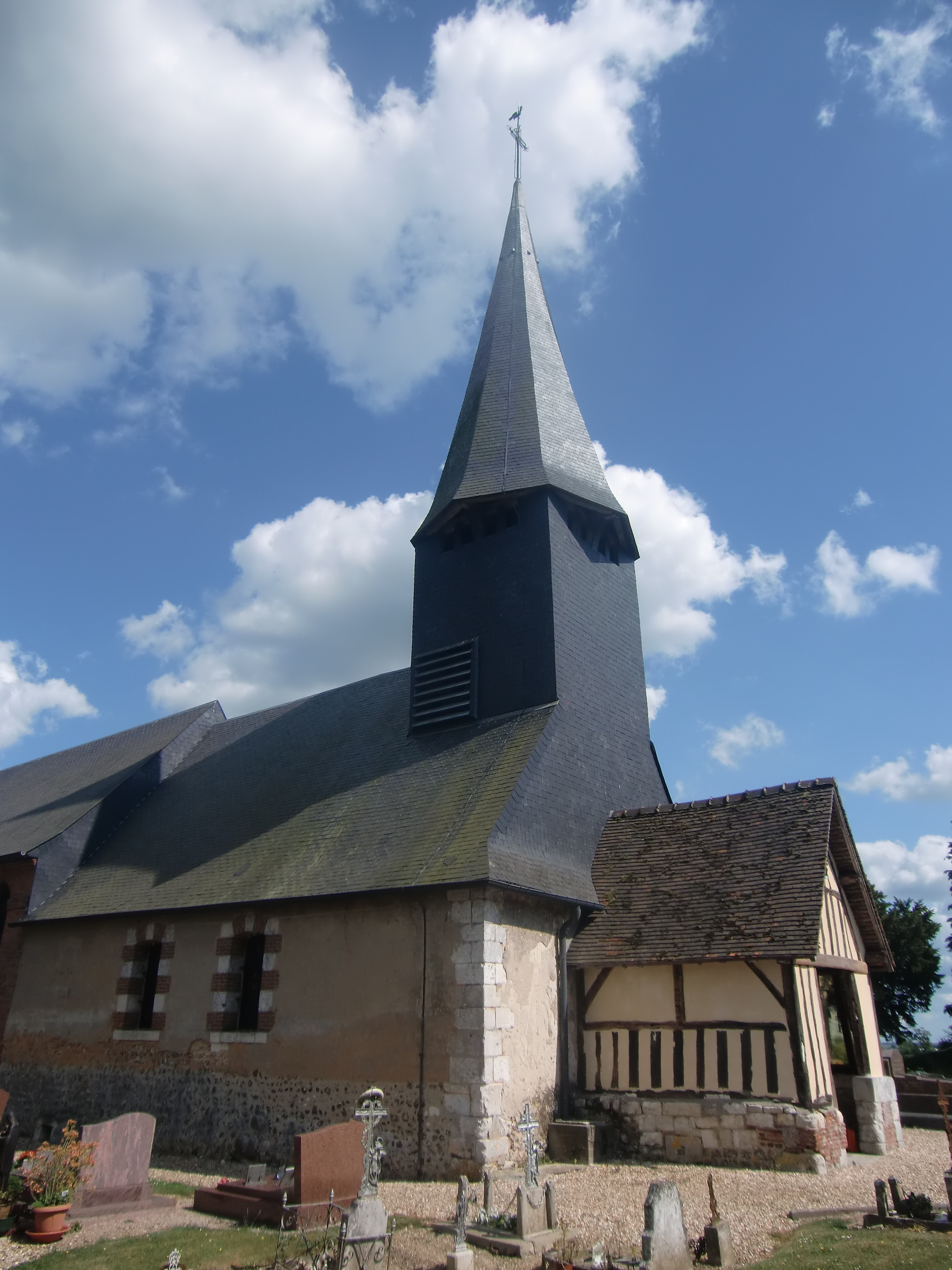 Eglise paroissiale de Thuit-Hébert (Eure, Normandie, France)